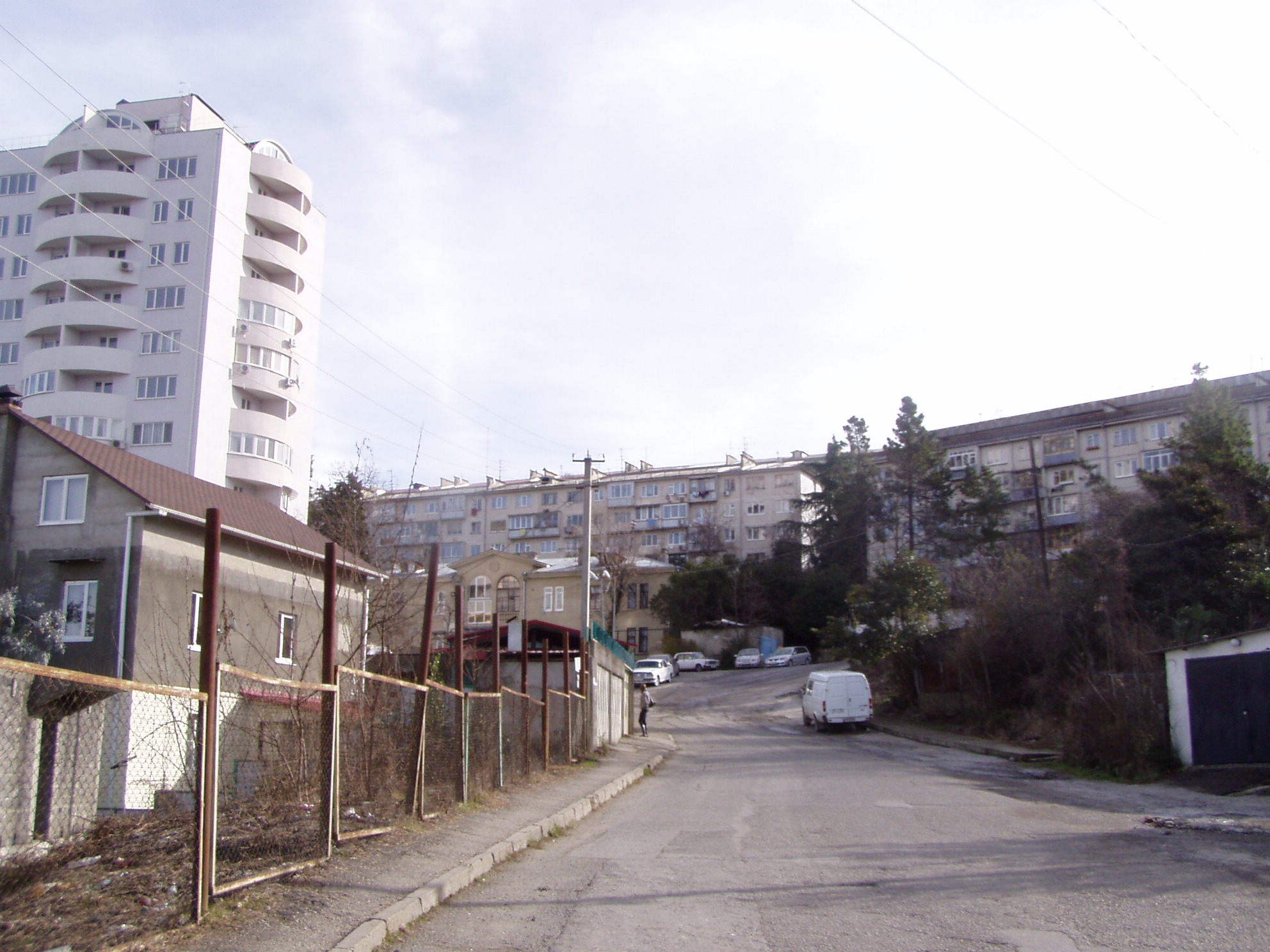 Вид на Севастопольскую улицу в Сочи